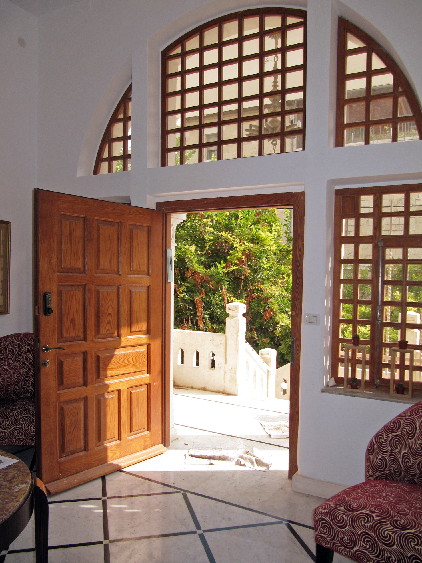 בית ג'לאט או בית הקרמיקה, הוא מבנה בשכונת טלביה, שנבנה עבור אליאס וקתרין ג'לאט. במלחמת העצמאות הועבר לעליית הנוער, ושוכנו בו ילדי משק ילדים מוצא. בהמשך הושכר לארגונים שונים, וכיום משמש בית מגורים. הקומה העליונה מעוטרת באריחי קרמיקה ארמנית, ועל הגג עיטורי פרחים ושיני חומה.